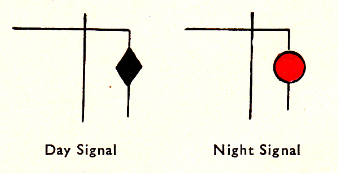 Les signaux d'avertissement du buster du sud affichés à Garden Island